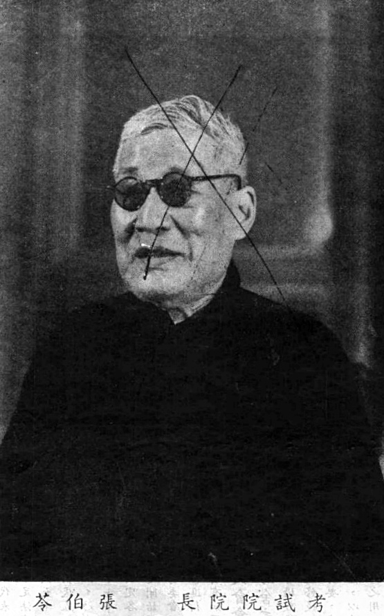 第一屆國民大會專輯圖片